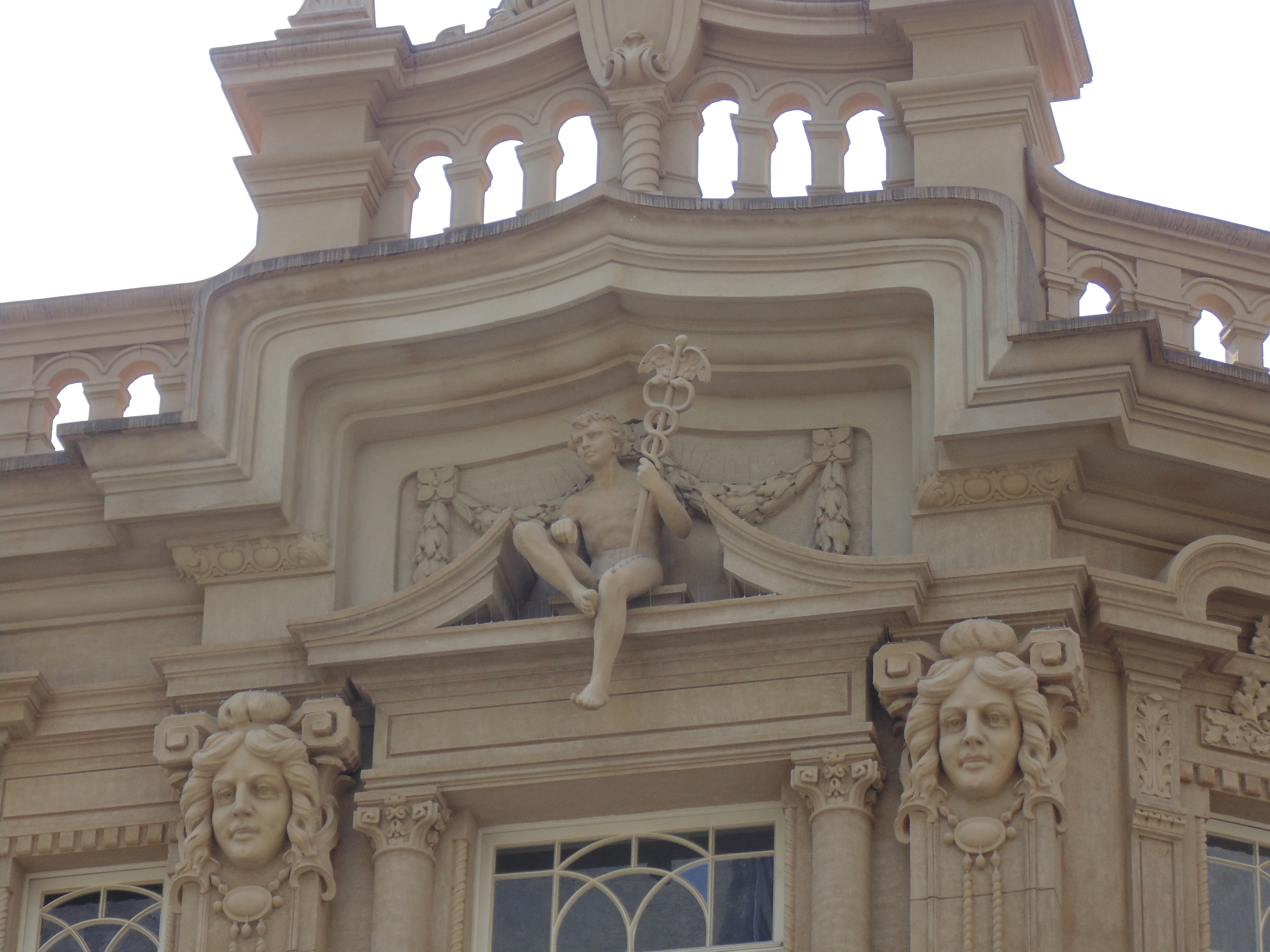 Escultura no topo do Palacete Tereza Toledo Lara, em São Paulo (SP), Brasil